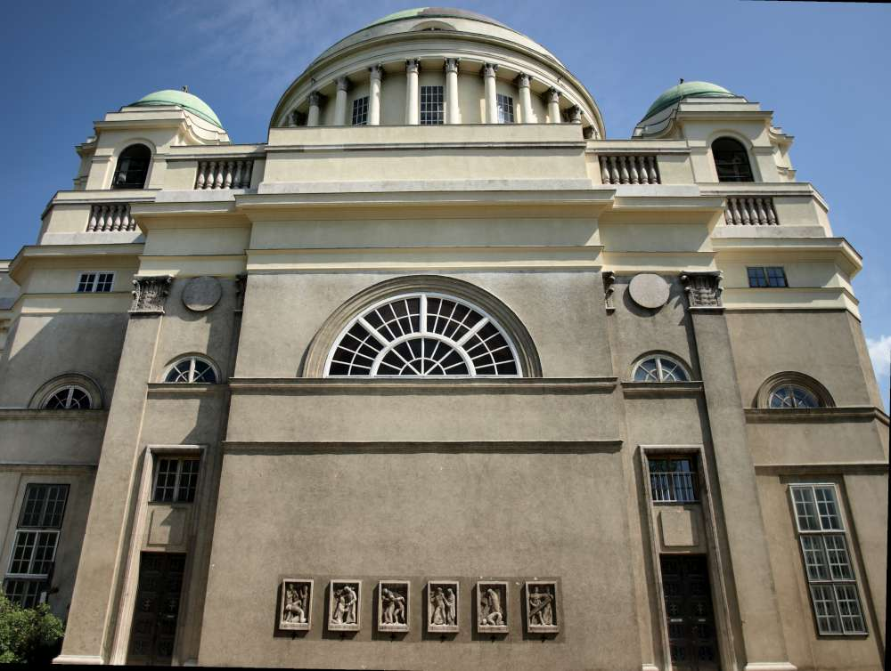 Tisztviselőtelepi Magyarok Nagyasszonya rk Plébániateplom. Épült 1924 és 1931 között Kismarty-Lechner Jenő tervei szerint